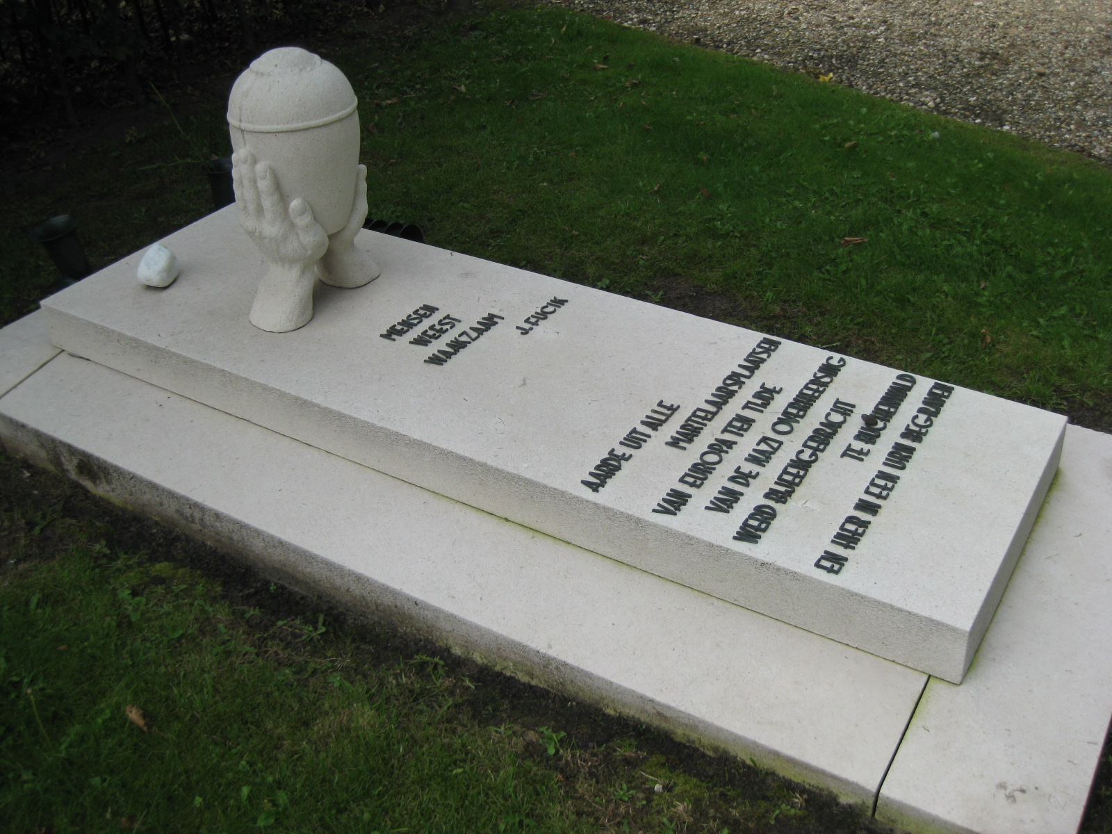 Monument Buchenwald ter nagedachtenis van de slachtoffers van de concentratiekampen, geplaatst in 1956 op begraafplaats De Nieuwe Ooster in Amsterdam